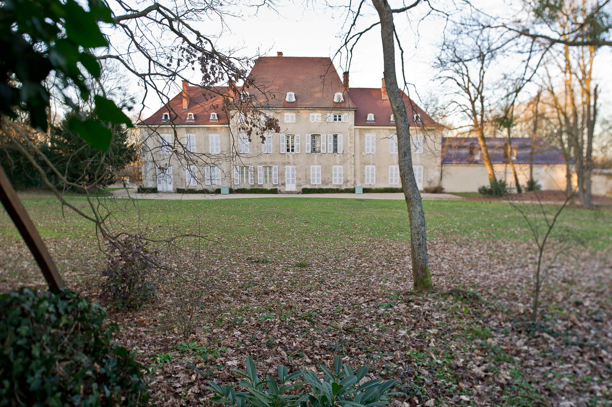 Château de Vallières, (ClasséInscritInscrit, 197419741988) .